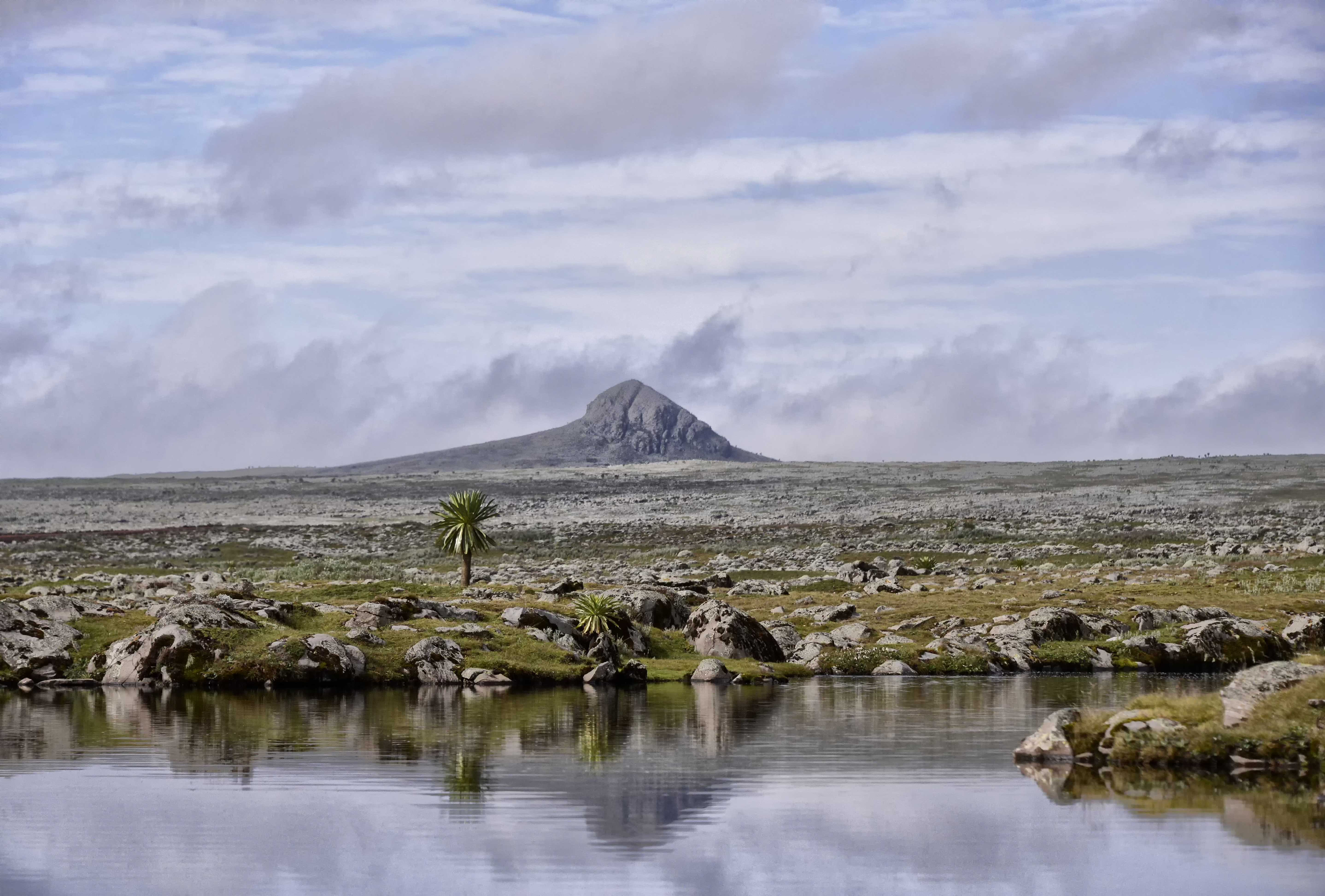 Sanetti Plateau, Ethiopia